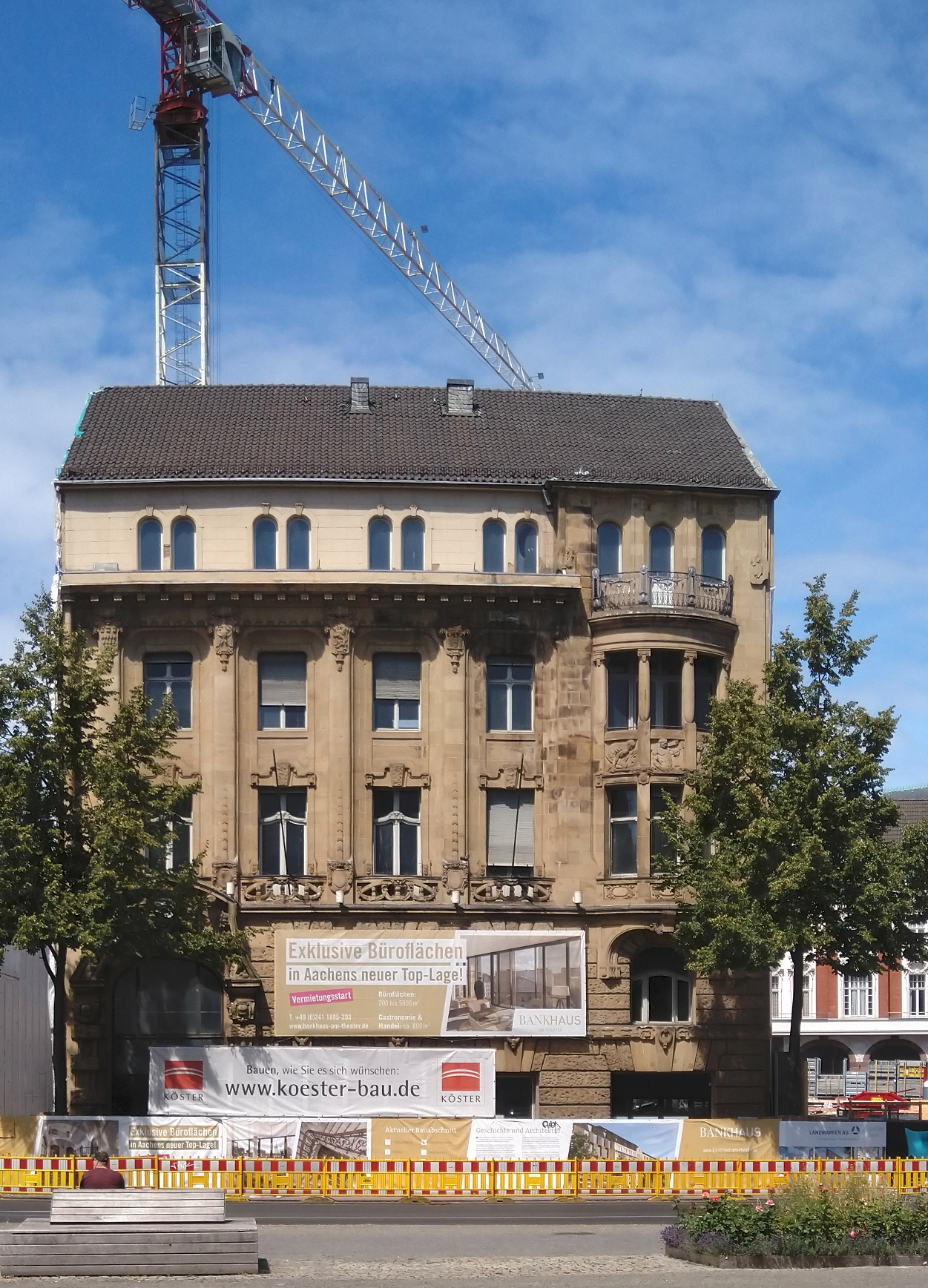 Das Bankhaus Kapuzinergraben in Aachen im Juli 2019, daneben die Baustelle des Neubaus "Motel One". Fotografiert aus Sicht des Theaters. Vorbeigehende Personen auf dem Bild wurden über eine Serienaufnahme (Image Stack) digital entfernt.